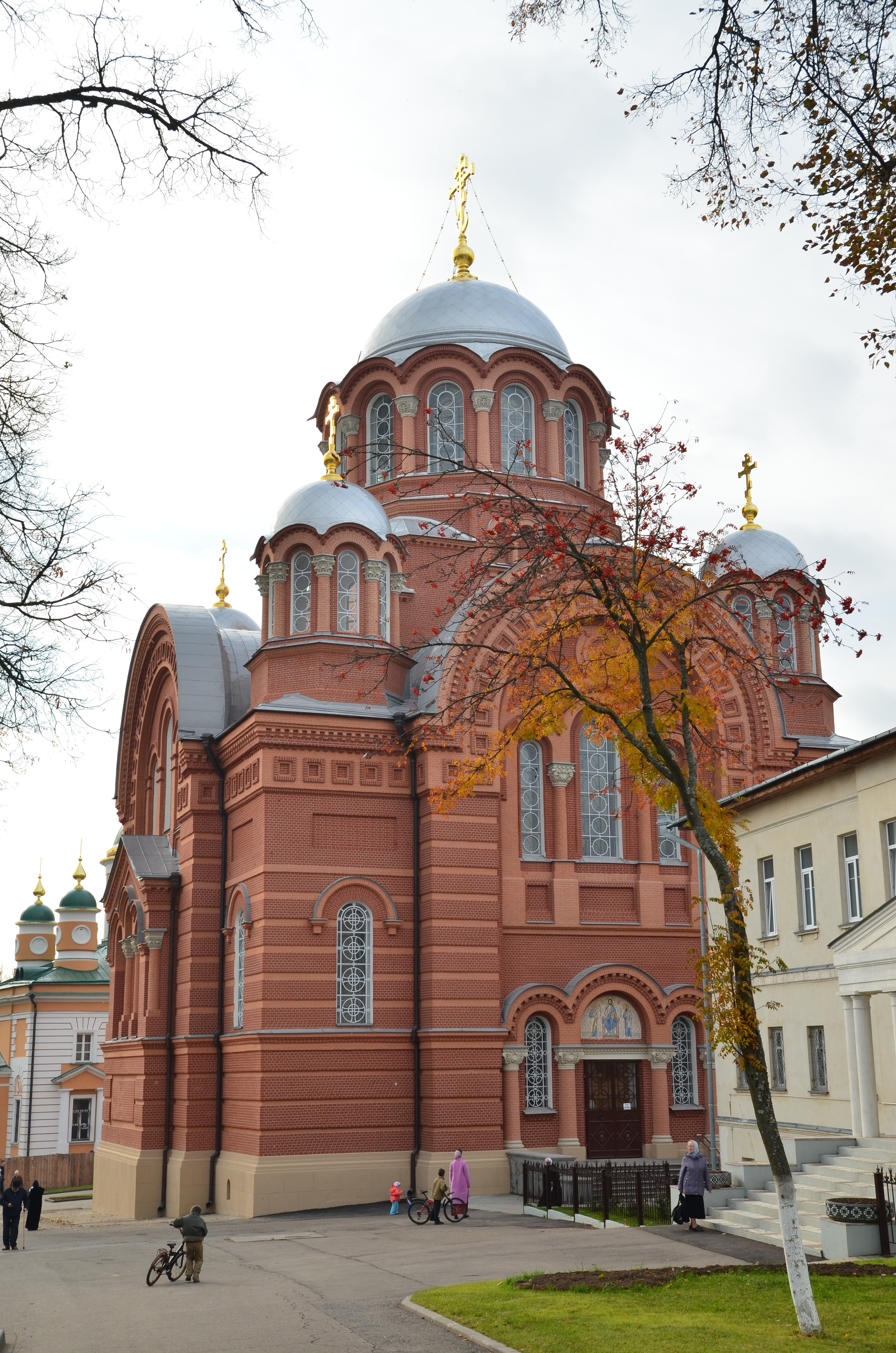 Церковь Николая Чудотворца: улица Кооперативная, Хотьково, Сергиево-Посадский район, Московская область